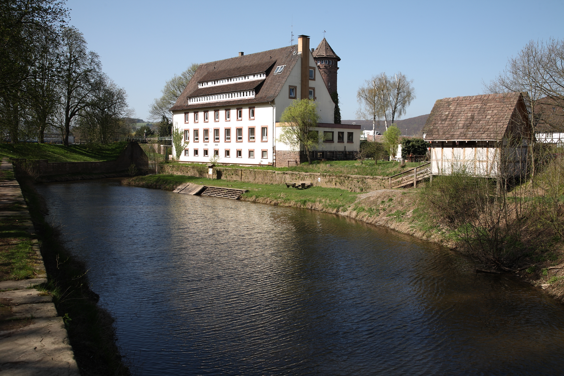 Historische Hafen- und Werftanlage plus die Jugendherberge in Holzminden (Bau des Hafens begann 1837).